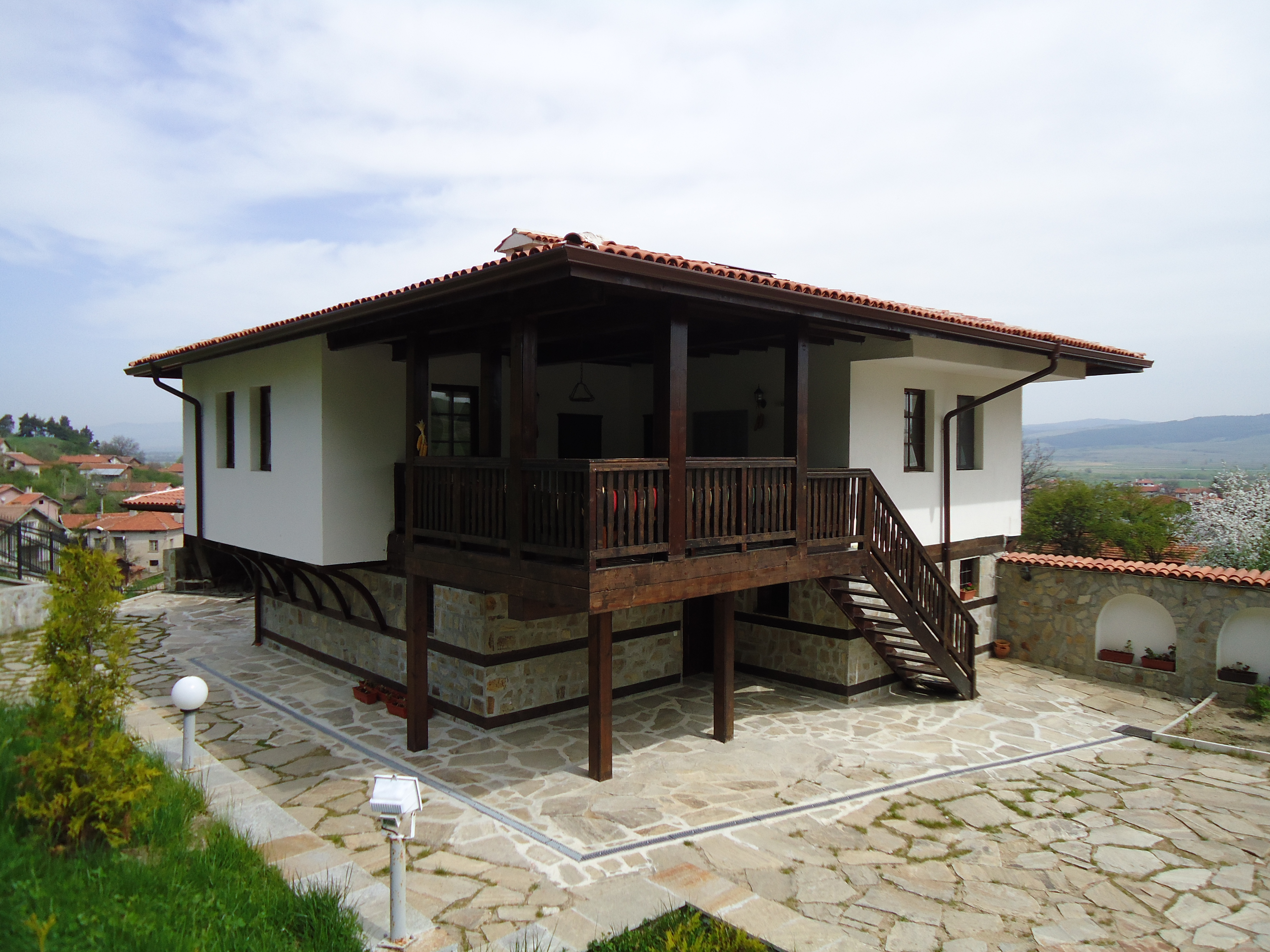 Етнографски музей - с.Белчин